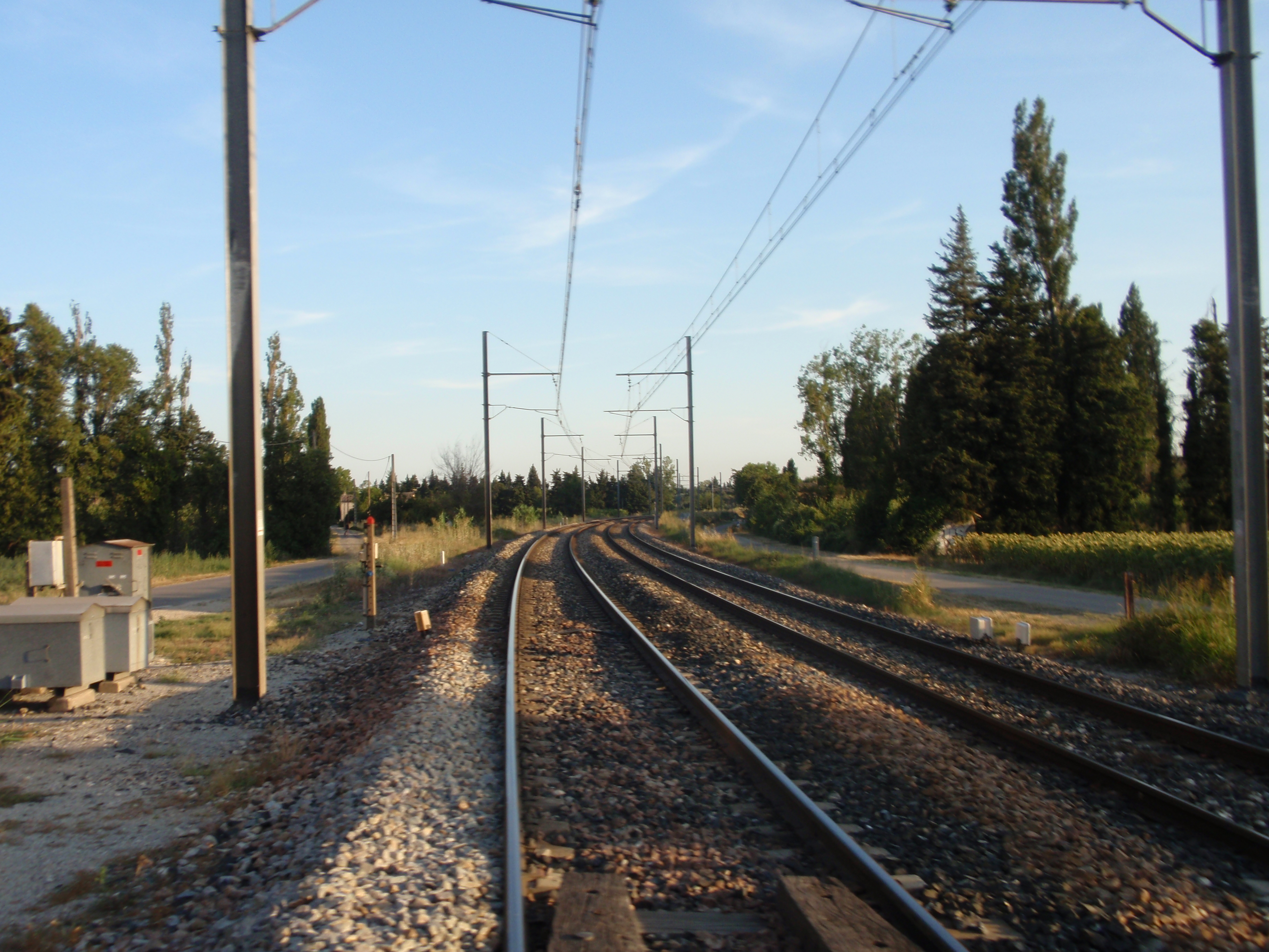 voie de chemin de fer sur D90 vers Cavaillon (Vaucluse, France).